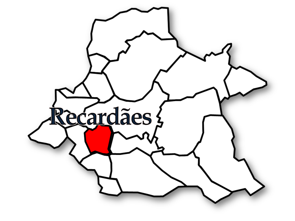 Censos 1864/2011